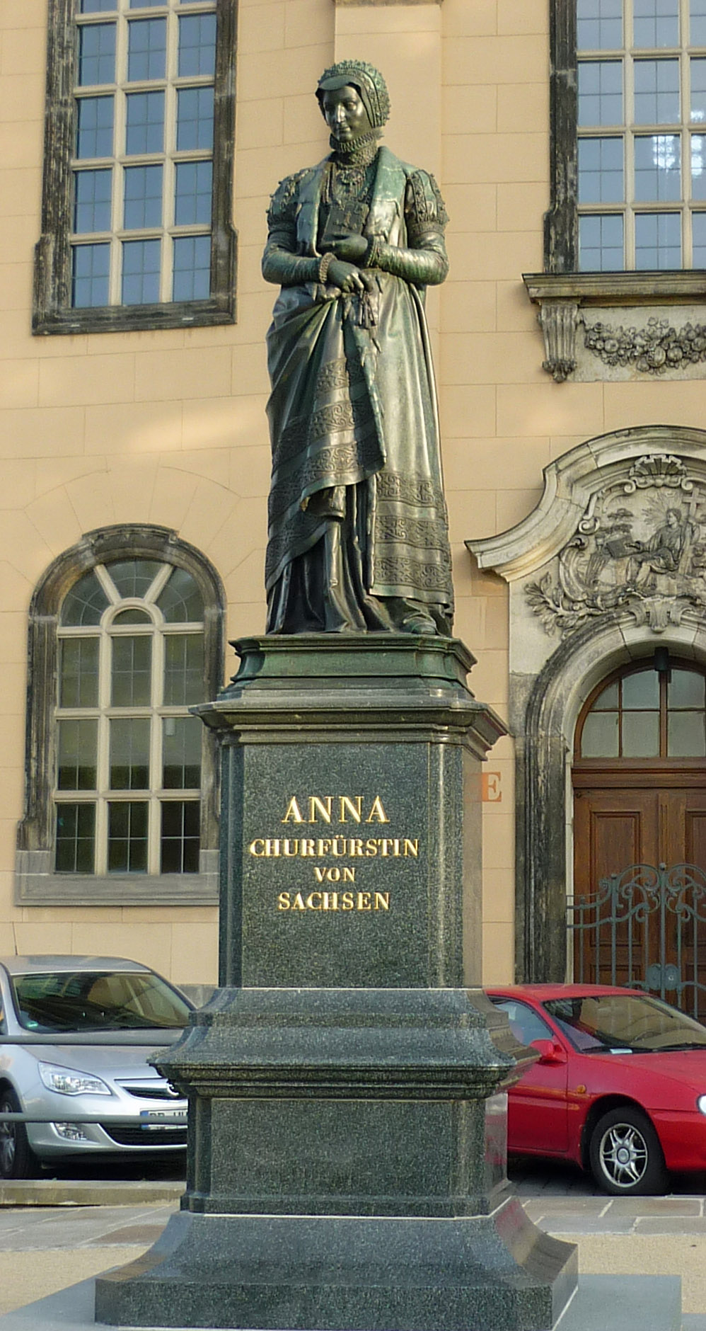 Denkmal der Kurfürstin Anna von Sachsen am neuen Standort Annenkirche in Dresden